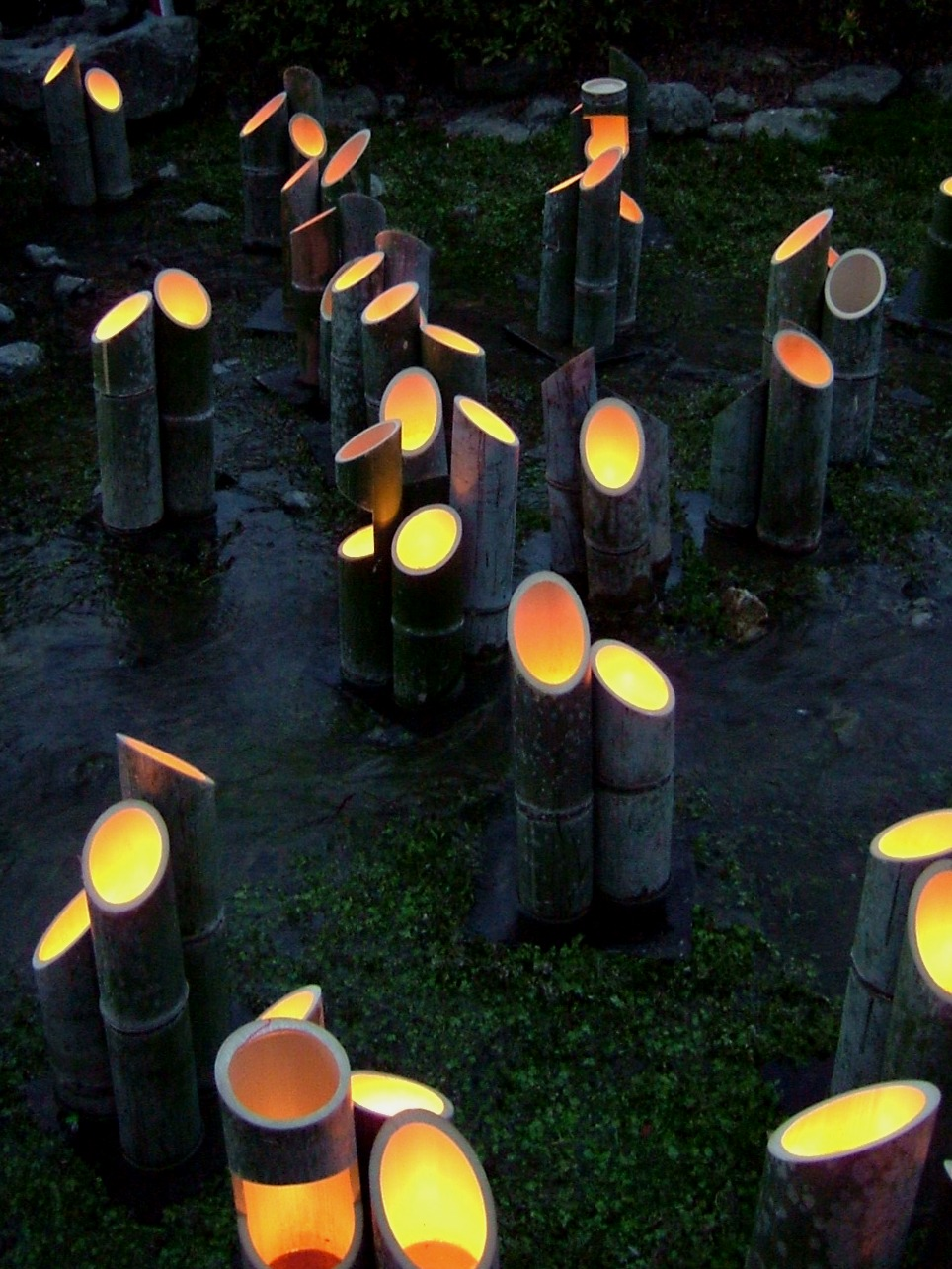 京都・東山花行路円山公園